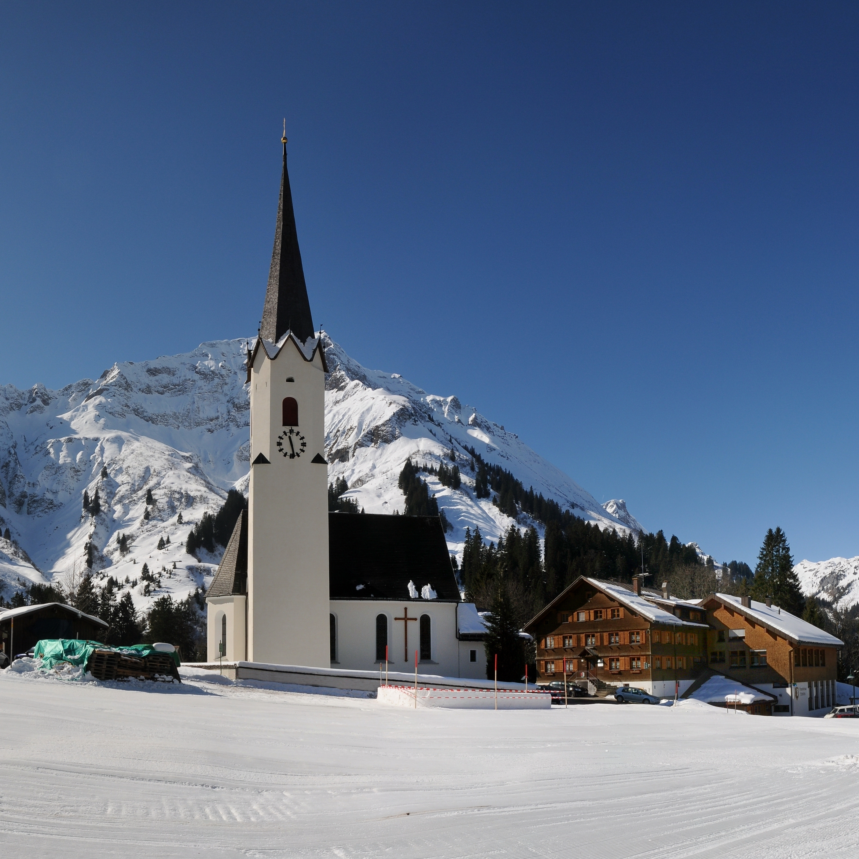 Pfarrkirche "Unsere Liebe Frau Mariä Himmelfahrt" von Schröcken im Bregenzerwald , Vorarlberg